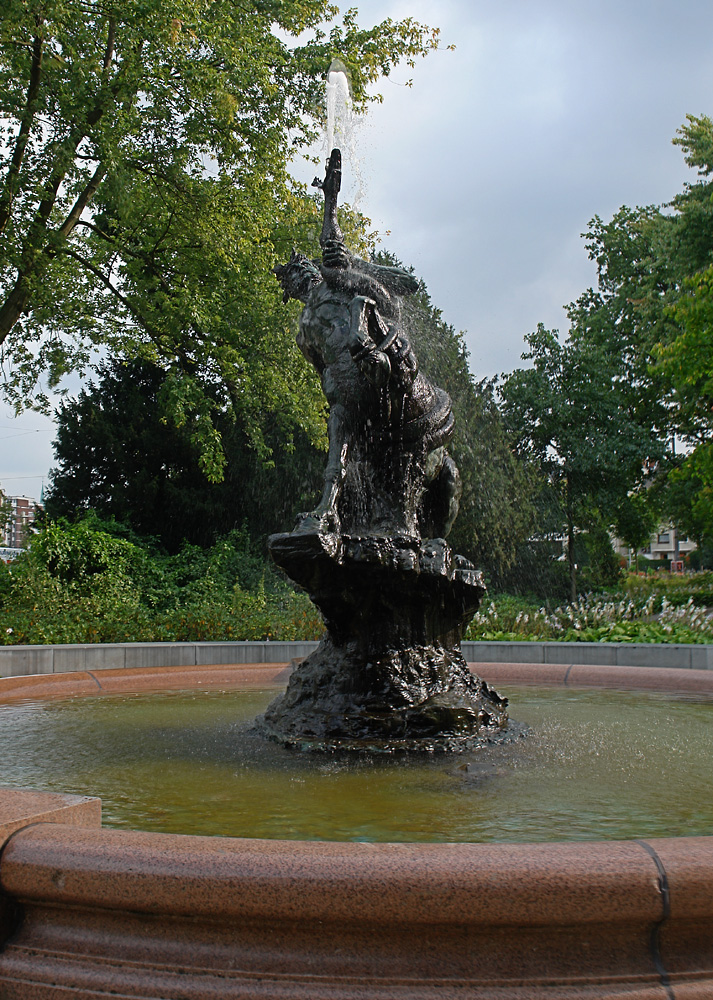 Bremen: Centaurenbrunnen am Leibnizplatz. Entwurf und Ausführung: August Sommer, errichtet 1891 Schwachhauser Heerstraße / Bismarckstraße), Umzug 1958 k: kunst im öffentlichen raum bremen Das abgebildete Objekt ist ein geschütztes Kulturdenkmal in der Freien Hansestadt Bremen, mit der Nr. 0937 beim Landesamt für Denkmalpflege registriert.